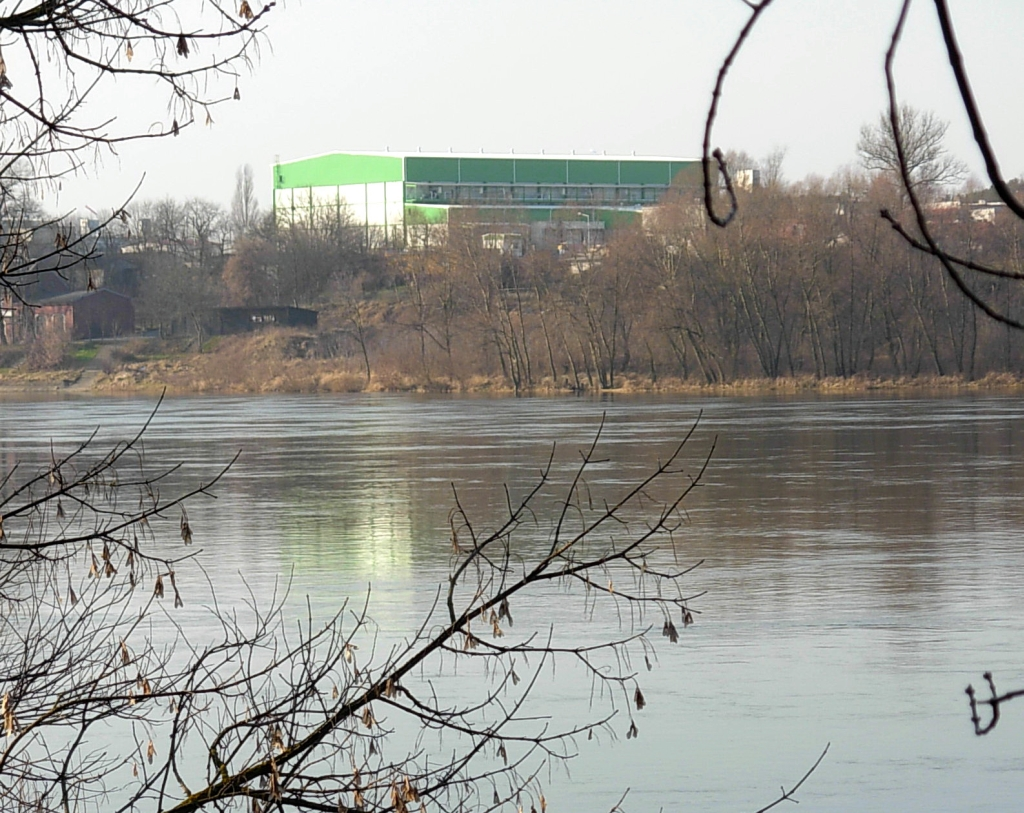 Hala przy ul. Kwarcowej w Brdyujściu - widok zza Wisły